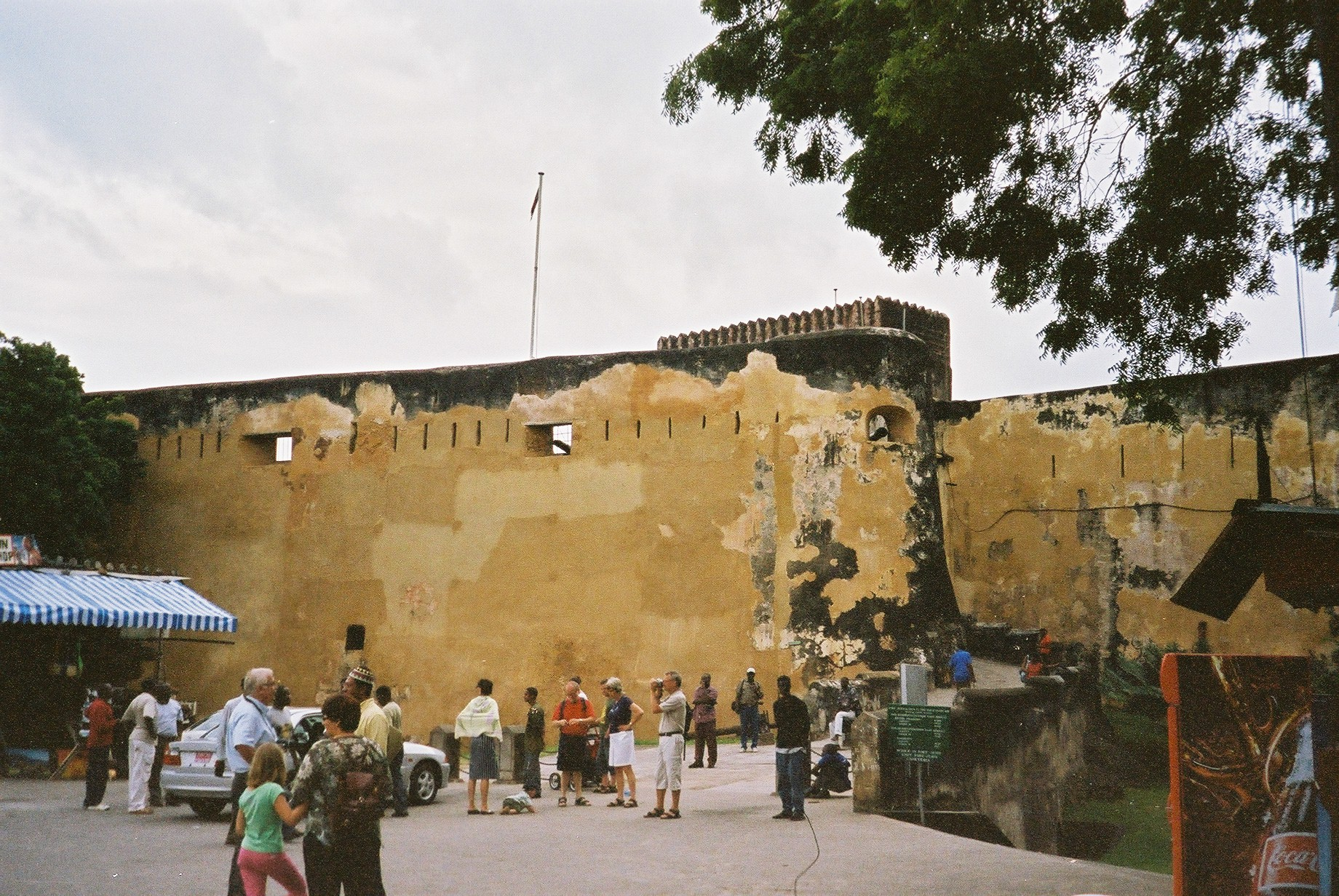 Kenya - Mombasa - Fort Jesus - L'entrée principale